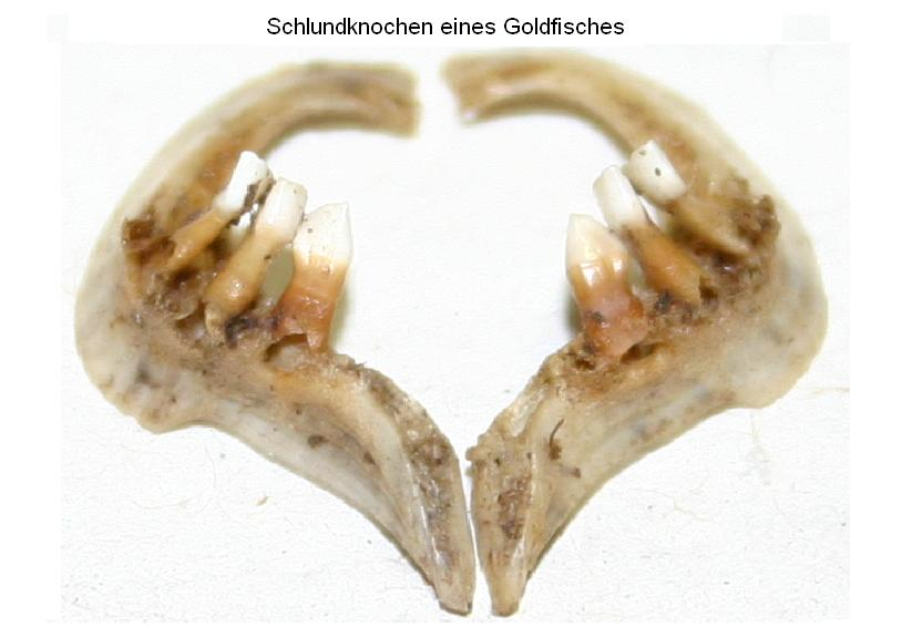 von uns fotografiert und zur Verfügung gestellt--BiotopAG 14:04, 30. Jan 2006 (CET)